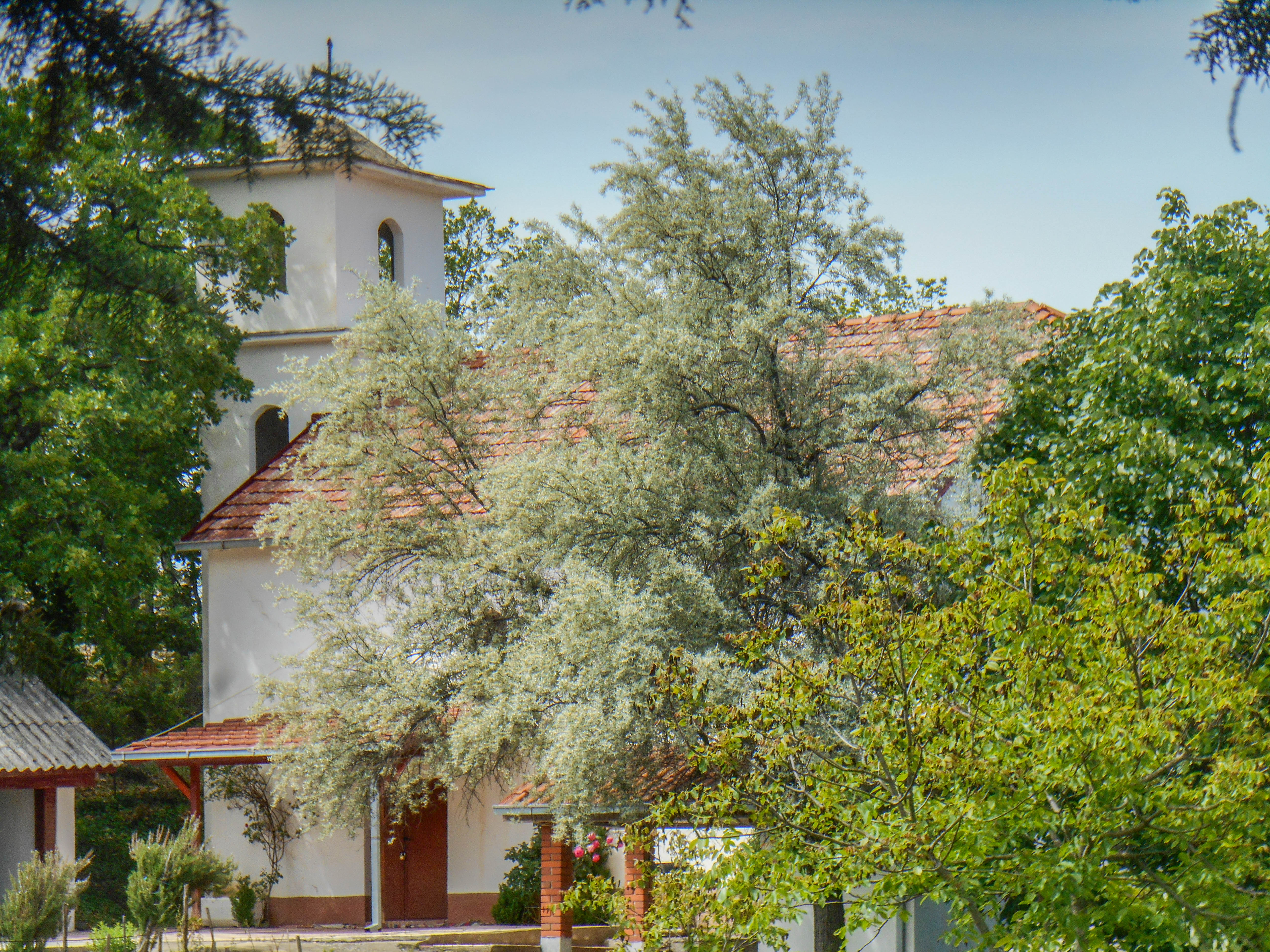 Црква во Дукатино